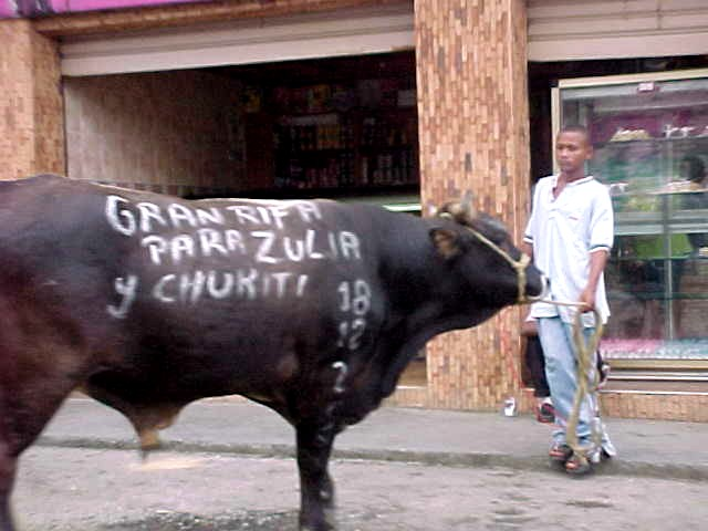 Rifa en Venezuela